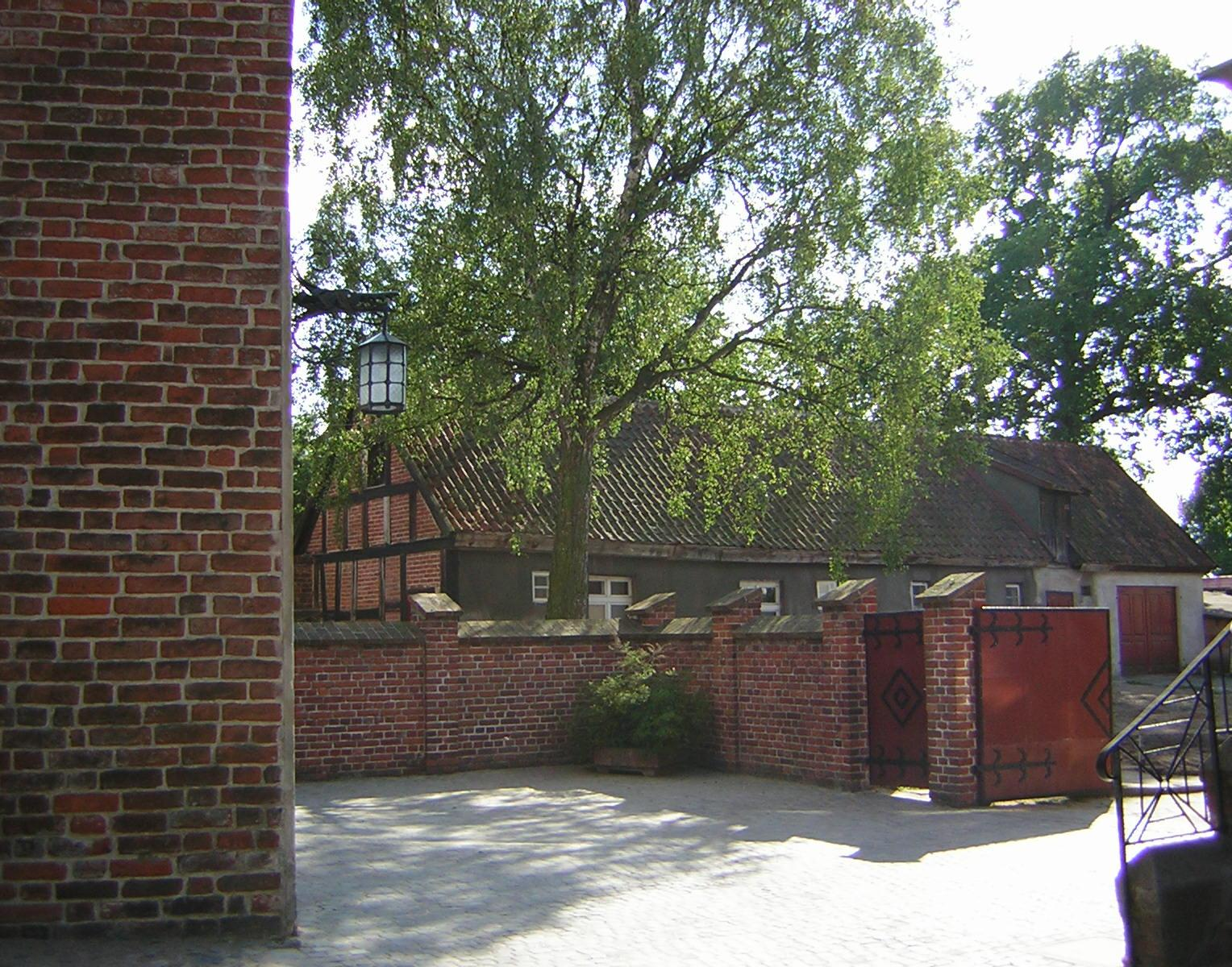 Plebania z XVII w. przy Kościele Przemienienia Pańskiego w Iławie (fragment}